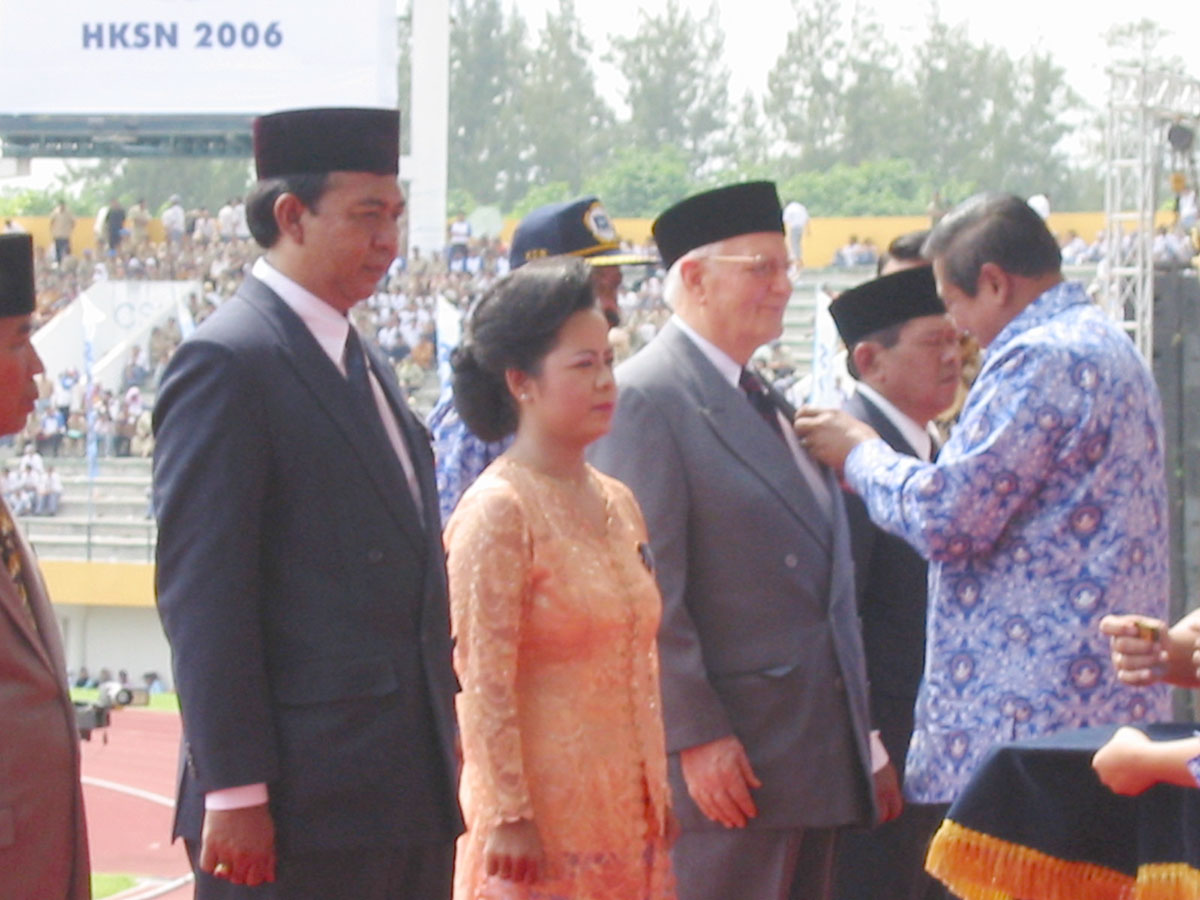 Penyematan Satya Lencana oleh Presiden RI ke 6 kepada Romo Janssen, di Solo, Jawa Tengah